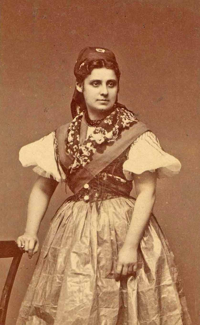 Felekyné Munkácsy Flóra. A betyár kendője szerepében. Hungarian Theatre Museum and Institute LocationBudapestCoordinates47° 29′ 51.75″ N, 19° 01′ 47.32″ E Established1952Web pageszinhaziintezet.hu Authority control : Q1226166 VIAF: 152589477 ISNI: 0000 0001 0945 5202 BNF: 123022856 NKC: mzk2010513258 institution QS:P195,Q1226166